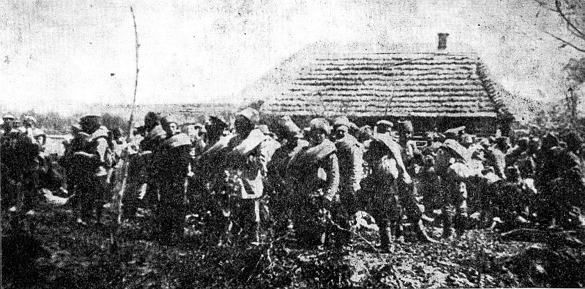 jeńcy rosyjscy po bitwie pod Gorlicami, maj 1915